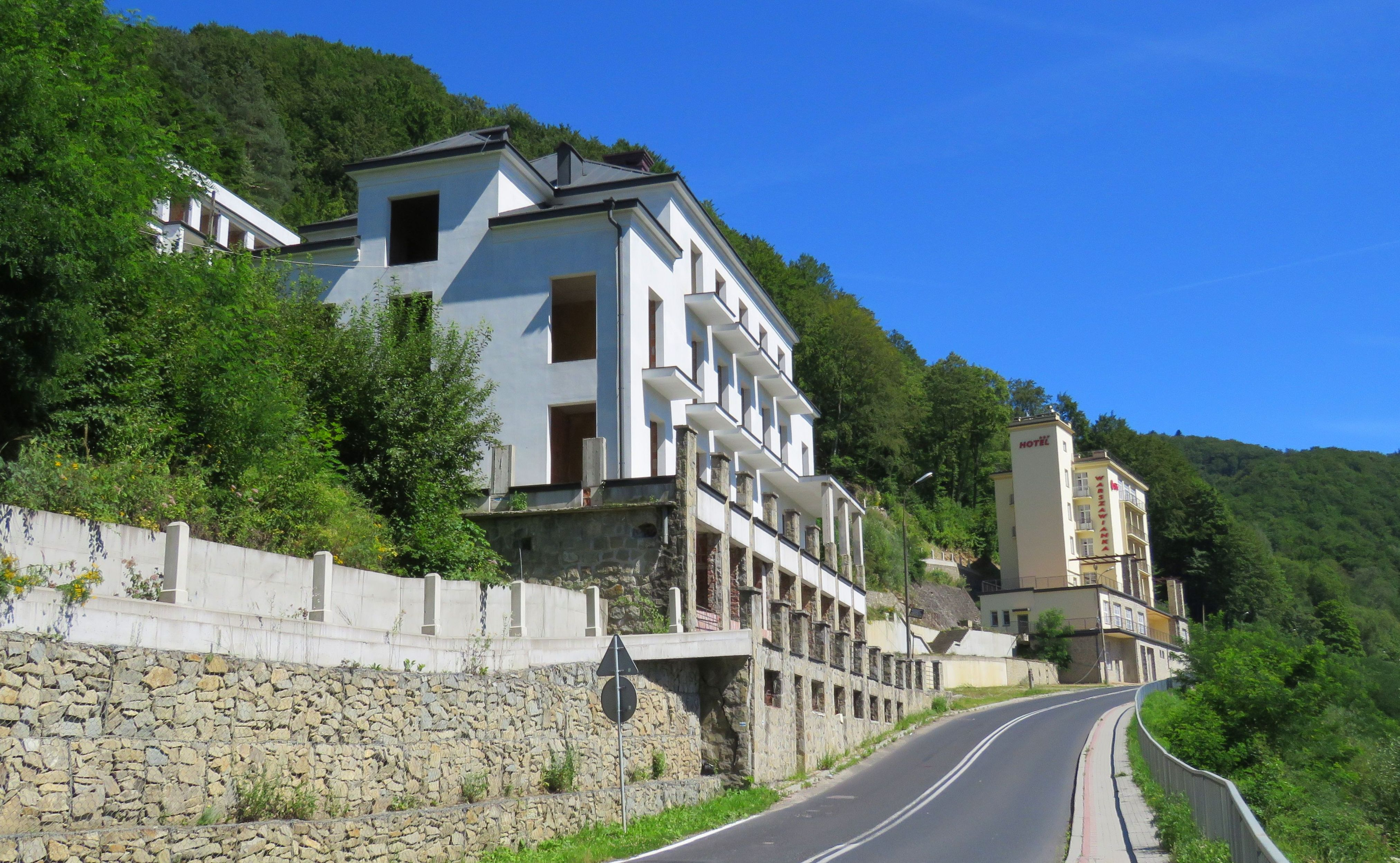 Żegiestów